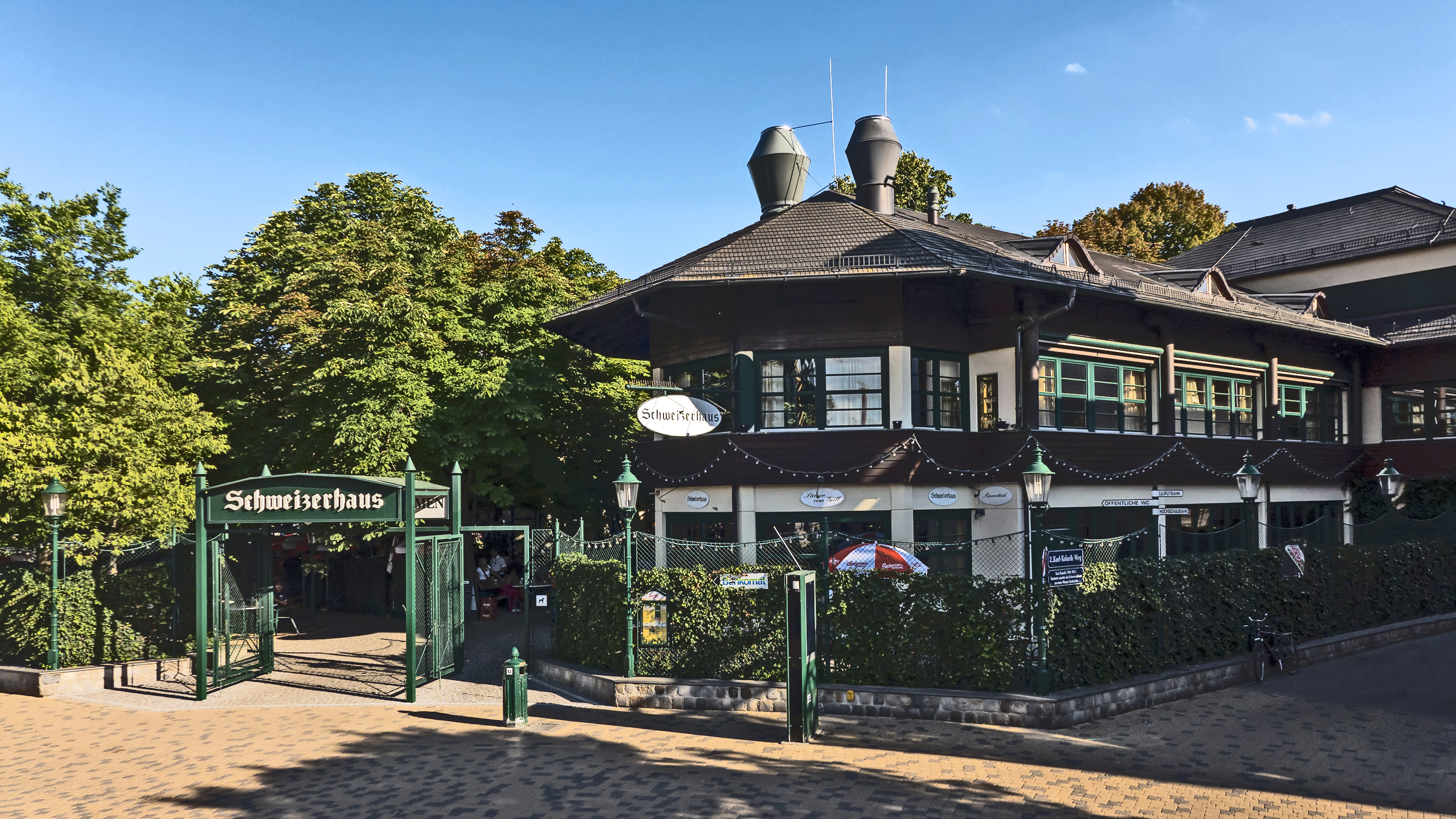 Schweizerhaus (Wien) im Wurstelprater in Wien 2